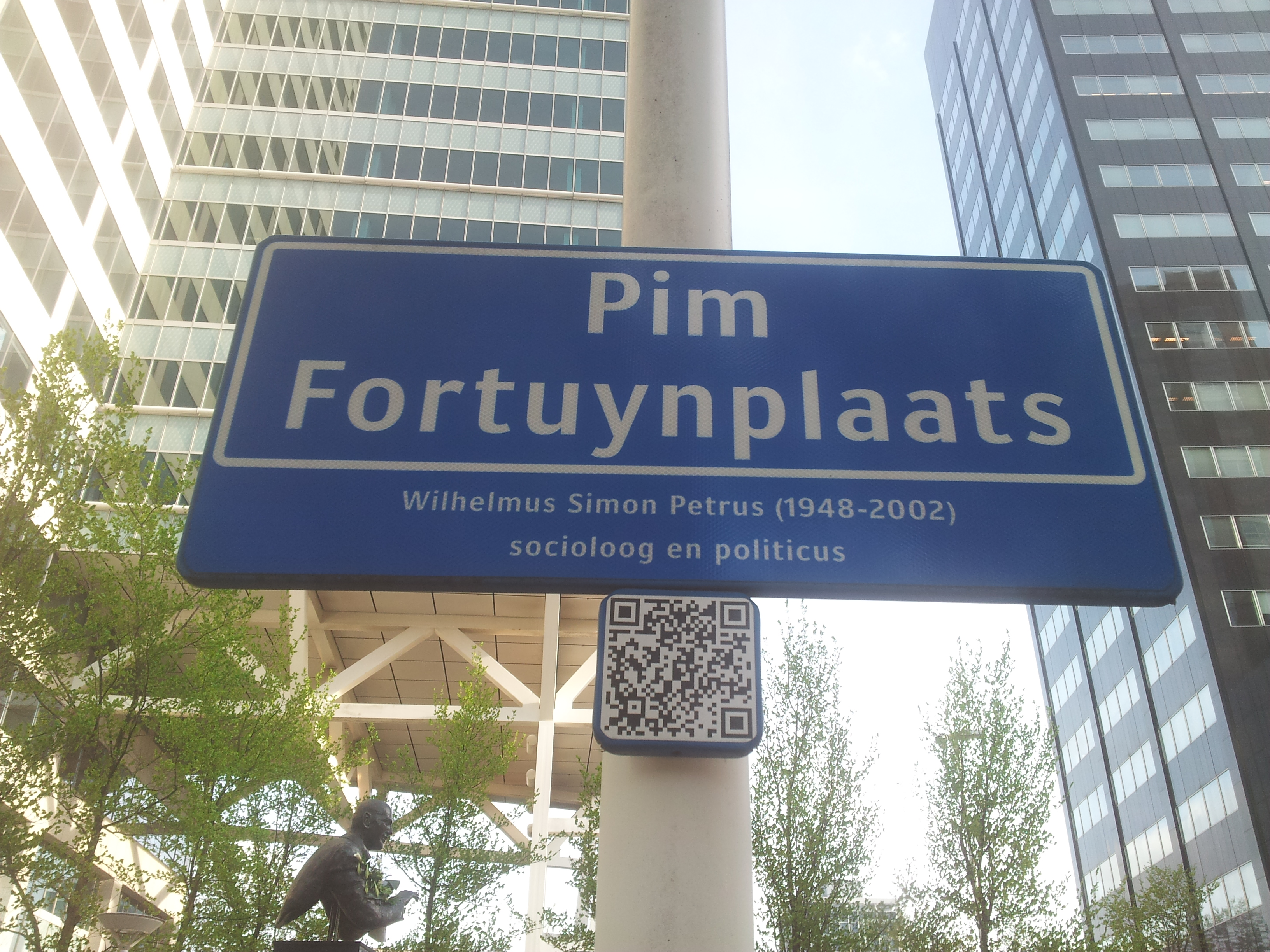 De Pim Fortuynplaats in 2015